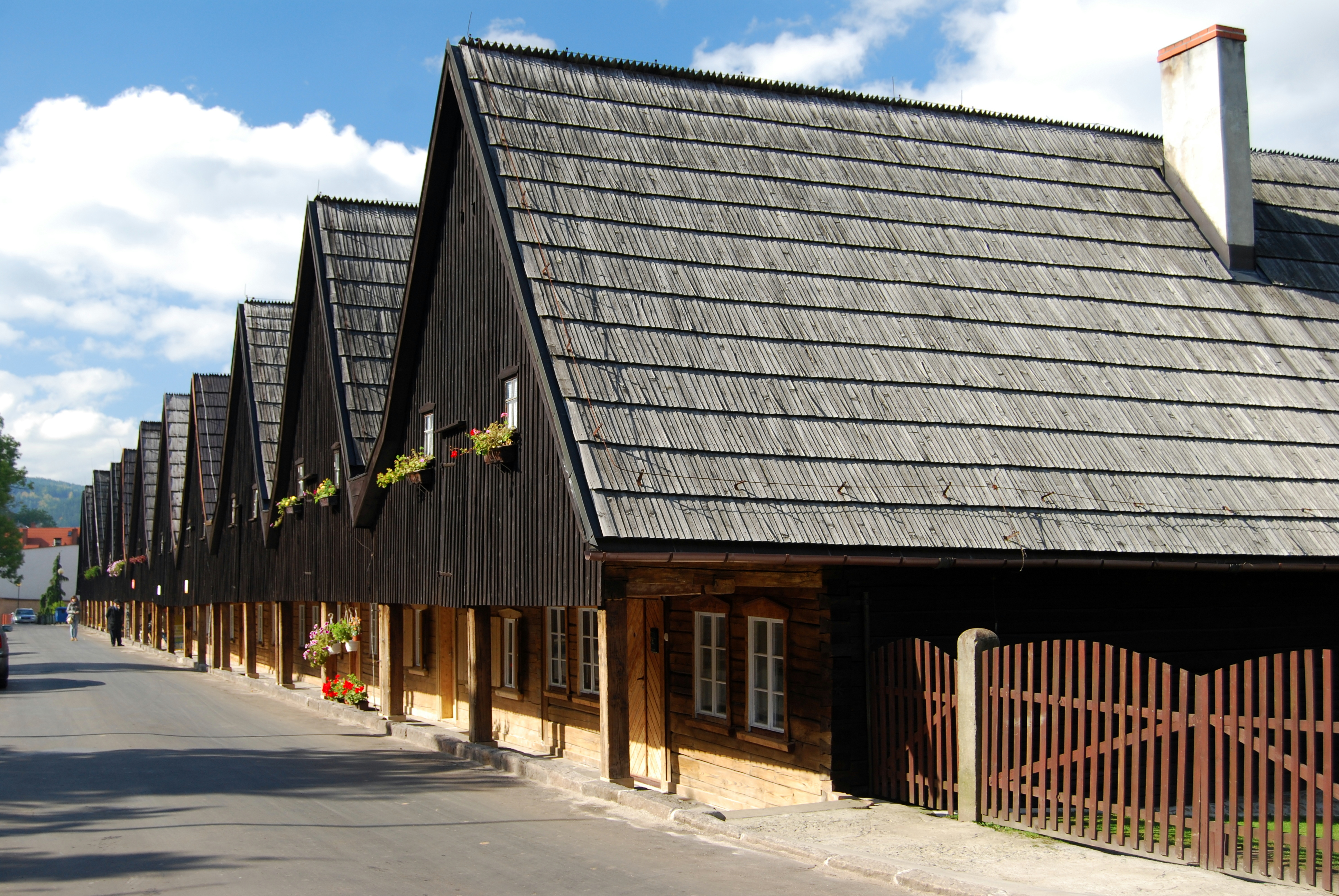 Chełmsko Śląskie, zespół domów, tzw. Dwunastu Apostołów, 1707